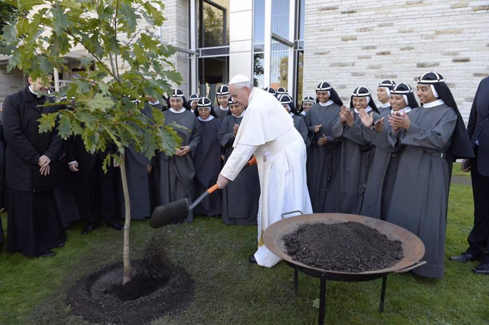 Paavst Franciscuse visiit Eestisse 25.09.2018